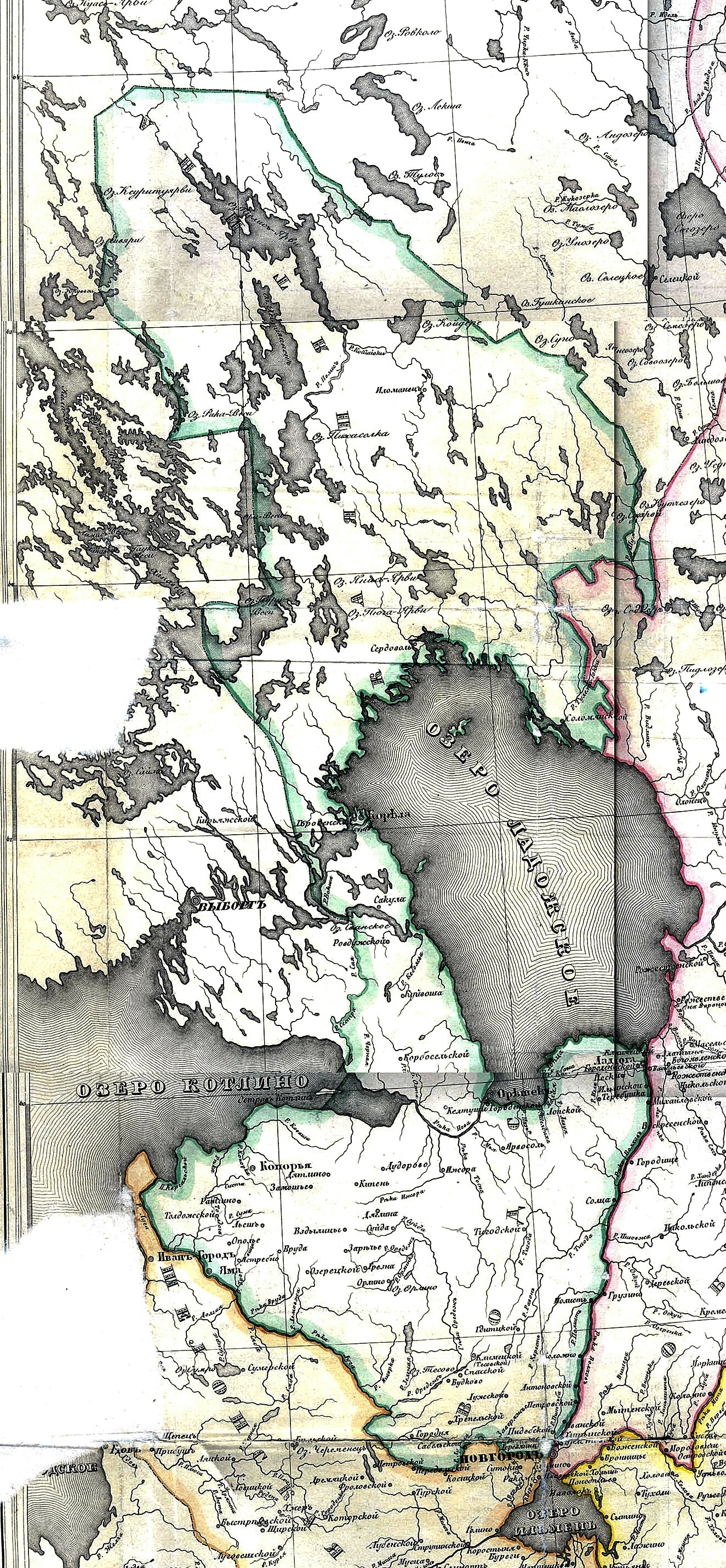 Водская пятина (или Вотская пятина, Вотьская пятина, Вотская земля) — северо-западная пятина Новгородской земли (XVI век)